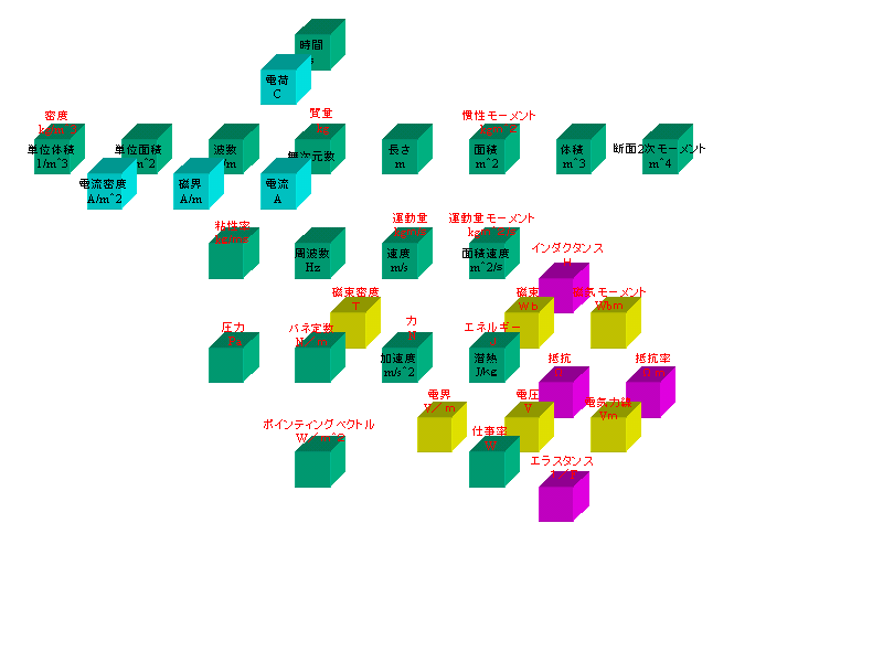 横方向で長さの次元が変わり、縦方向で時間の次元が変わる。上面が質量の次元で、奥が電流の次元を表す。